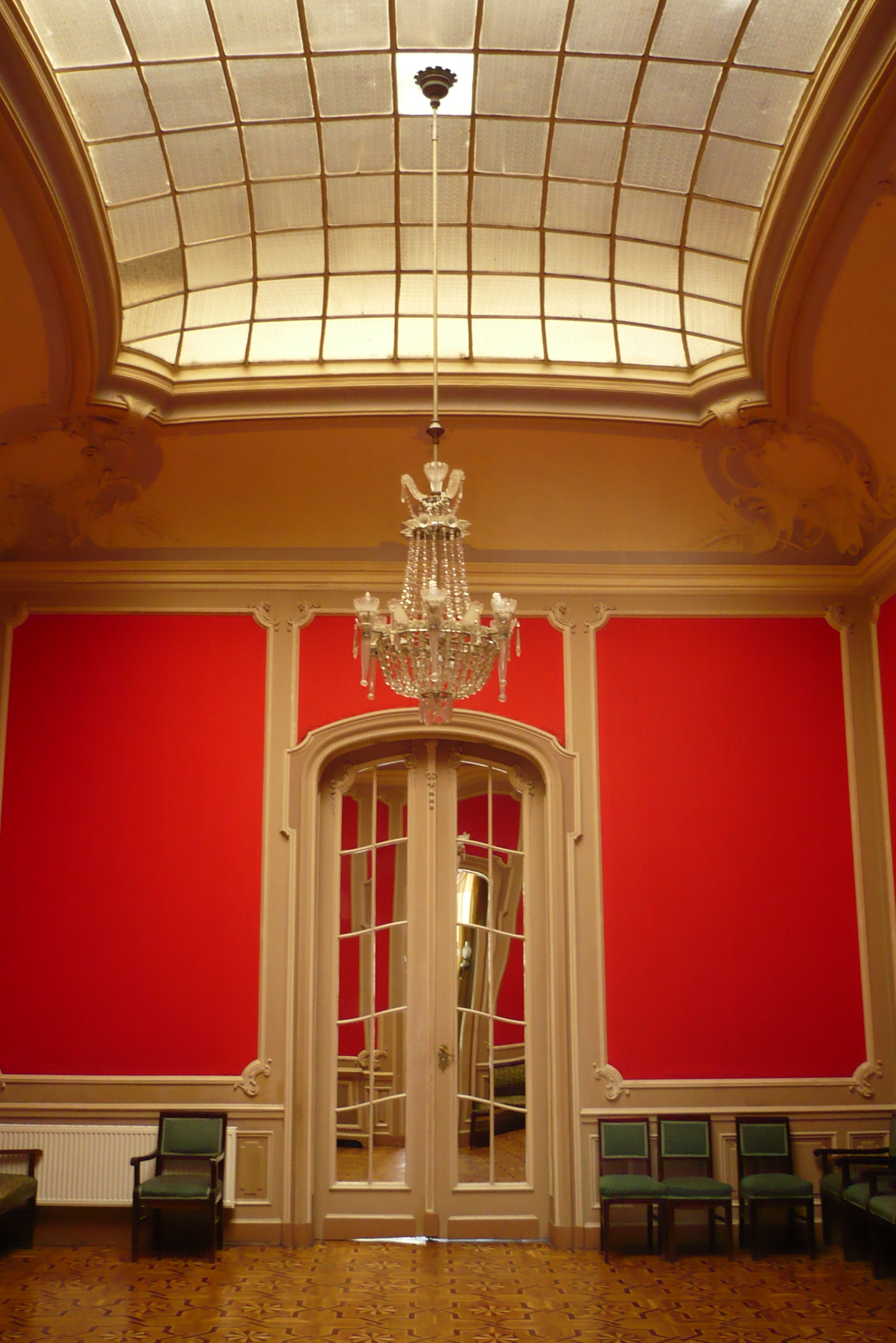 Kasyno Szlacheckie we Lwowie